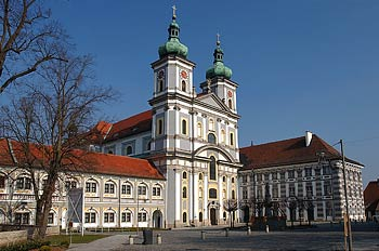 Basilika von Waldsassen